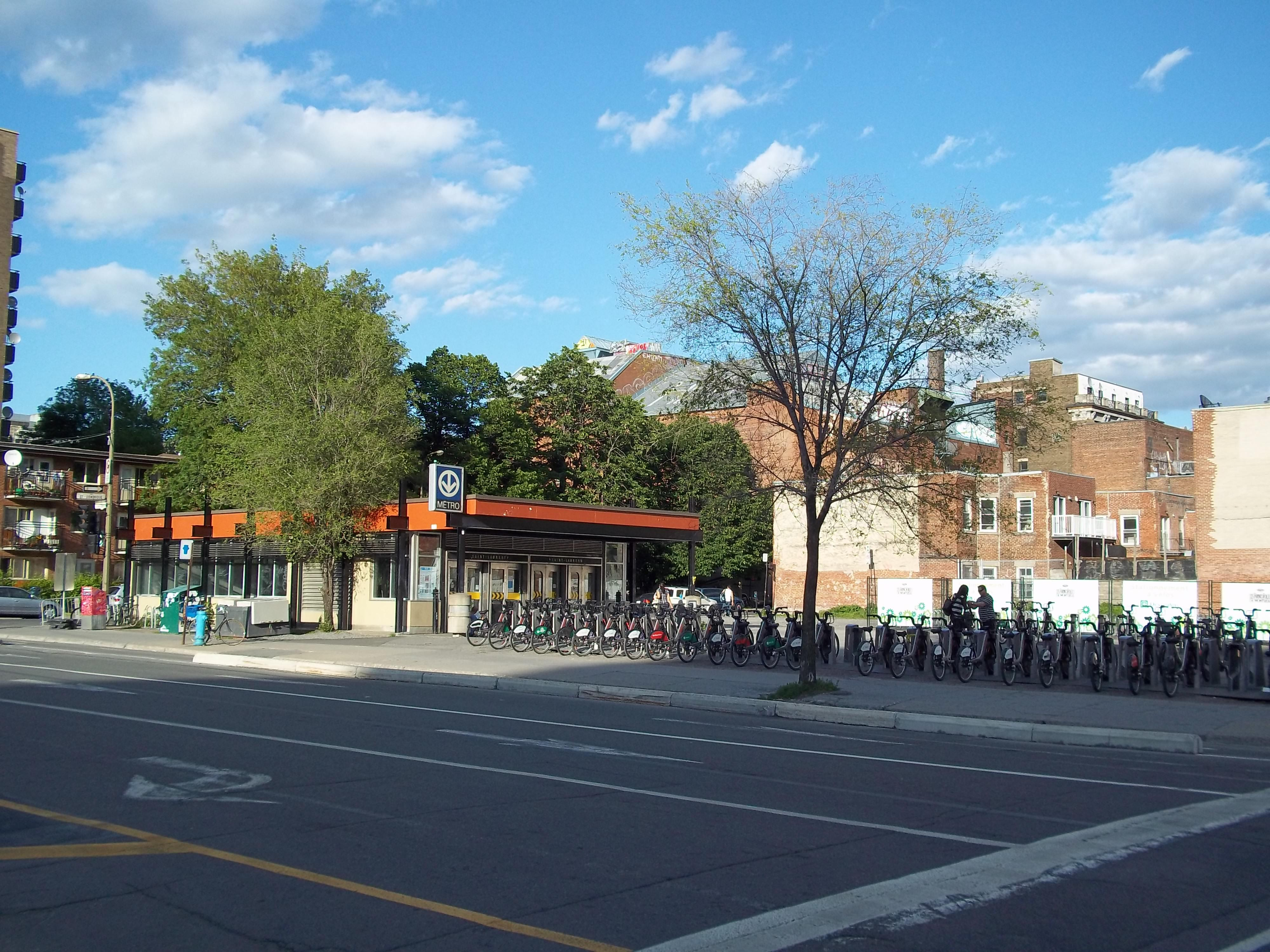 Édicule de la station Saint-Laurent du métro de Montréal à l'angle du boulevard Saint-Laurent et du boulevard de Maisonneuve